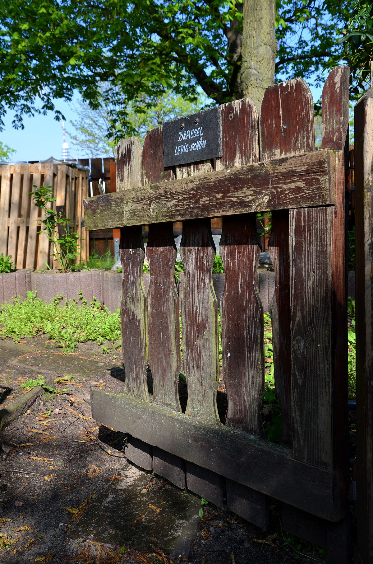 Impressionen rund um den Burgdorfer Damm 63 und der Misburger Straße in Hannover, dem ehemaligen Wohnsitz der Künstlerin Käte Ledig-Schön ...